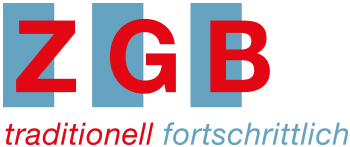 Logo der Zentralgewerbeschule Buchen